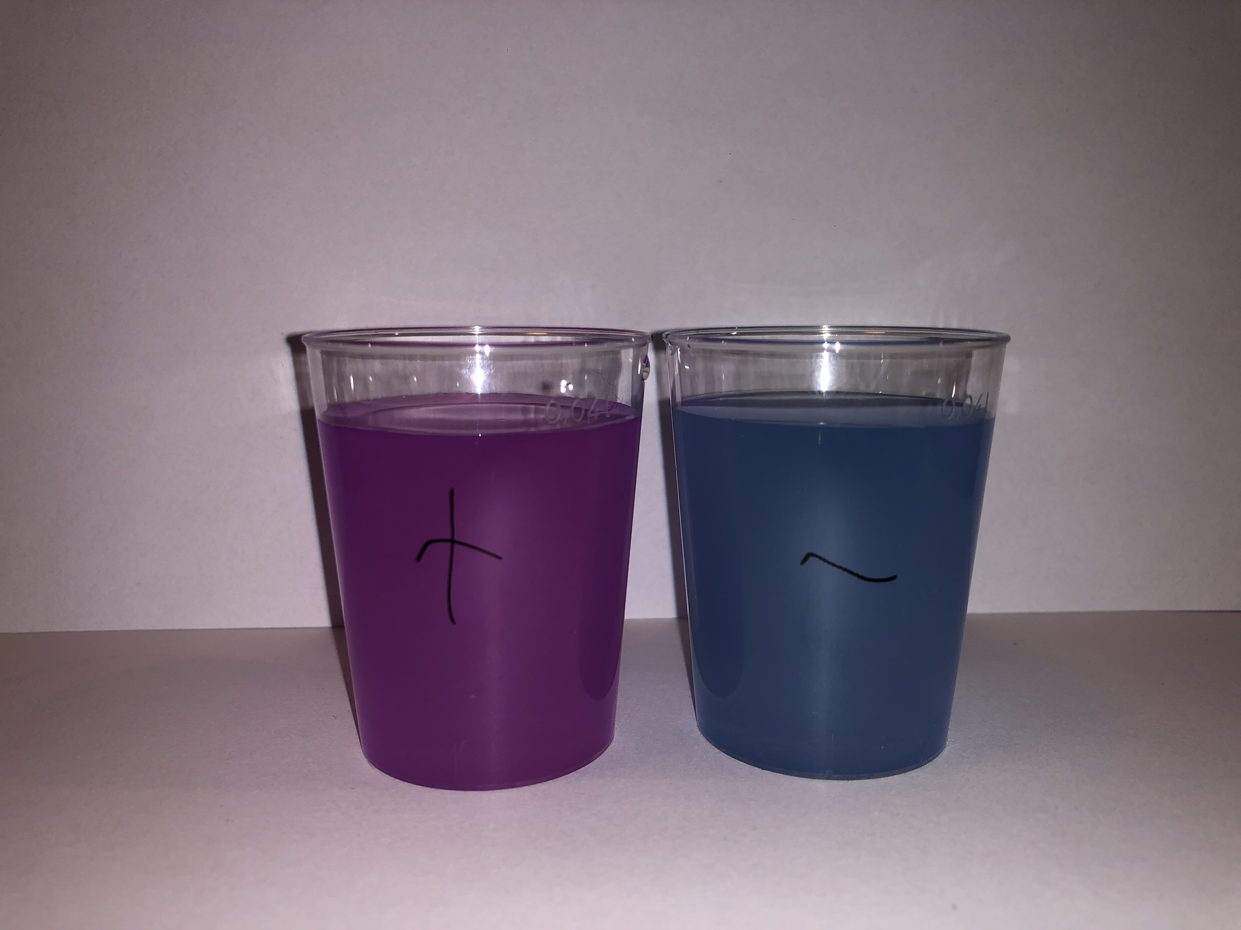 Lilla positiivne ja helesinine negatiivne biureeditesti tulemus